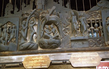 Représentation d'une scène de Jataka, Monastère de Yoak Sone (Myanmar, Sale,1882)